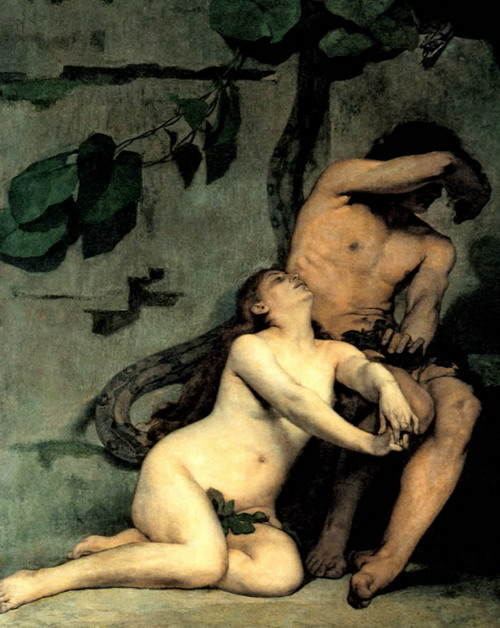 Картина на біблійну тему роботи Фернана Пелеца